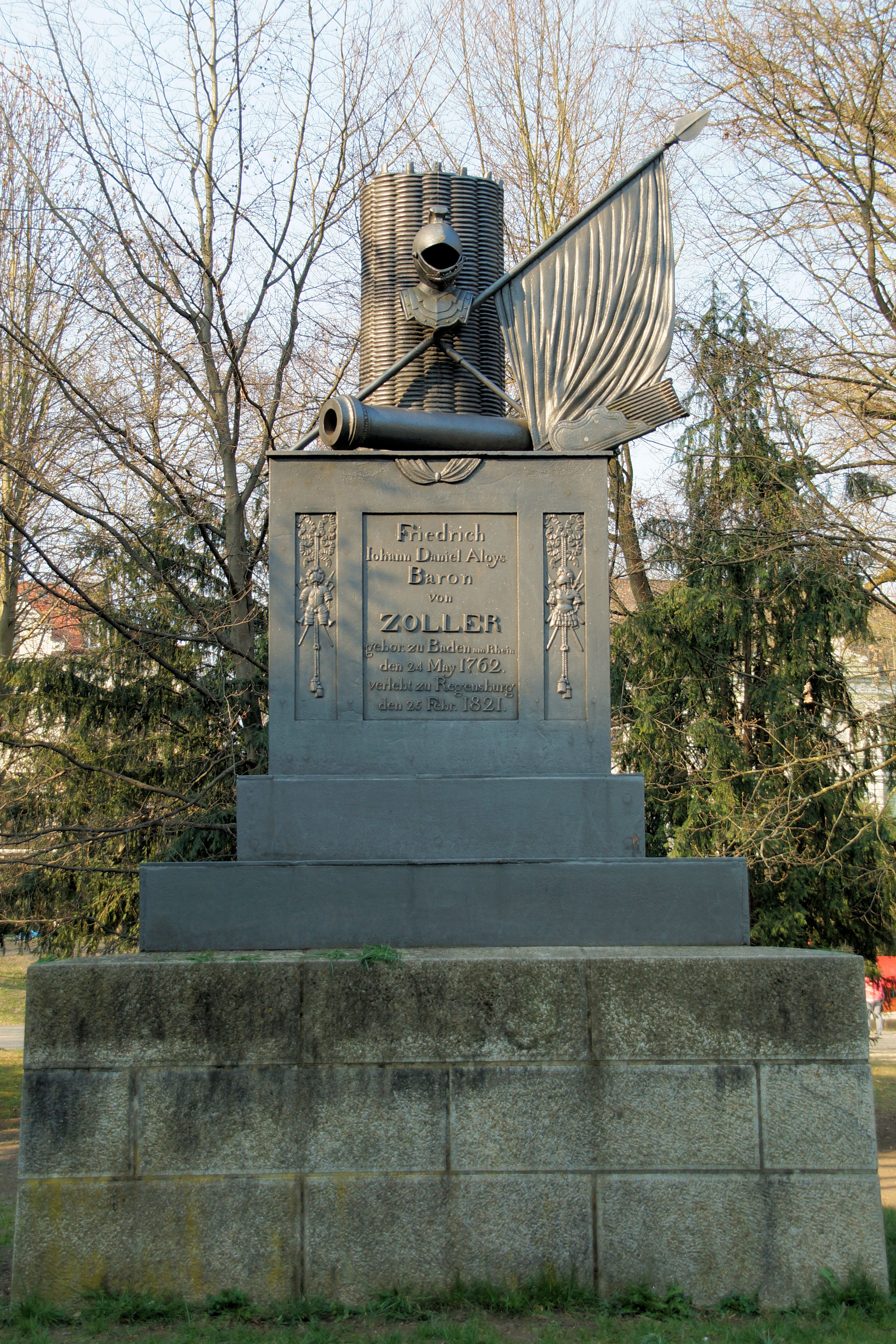 Denkmal für Generalleutnant Friedrich Freiherr von Zoller, Inschriftpodest mit Waffentropaion, Eisenguss auf Steinsockel, klassizistisch, 1821, gegossen im Eisengusswerk Bodenwöhr, Modell von Joseph Hundertpfund nach Entwurf von Ignaz Bergmann; am Studentenwiesl.